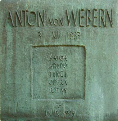 Памятная табличка на бывшем доме А.Веберна в Миттерзиле (Австрия)